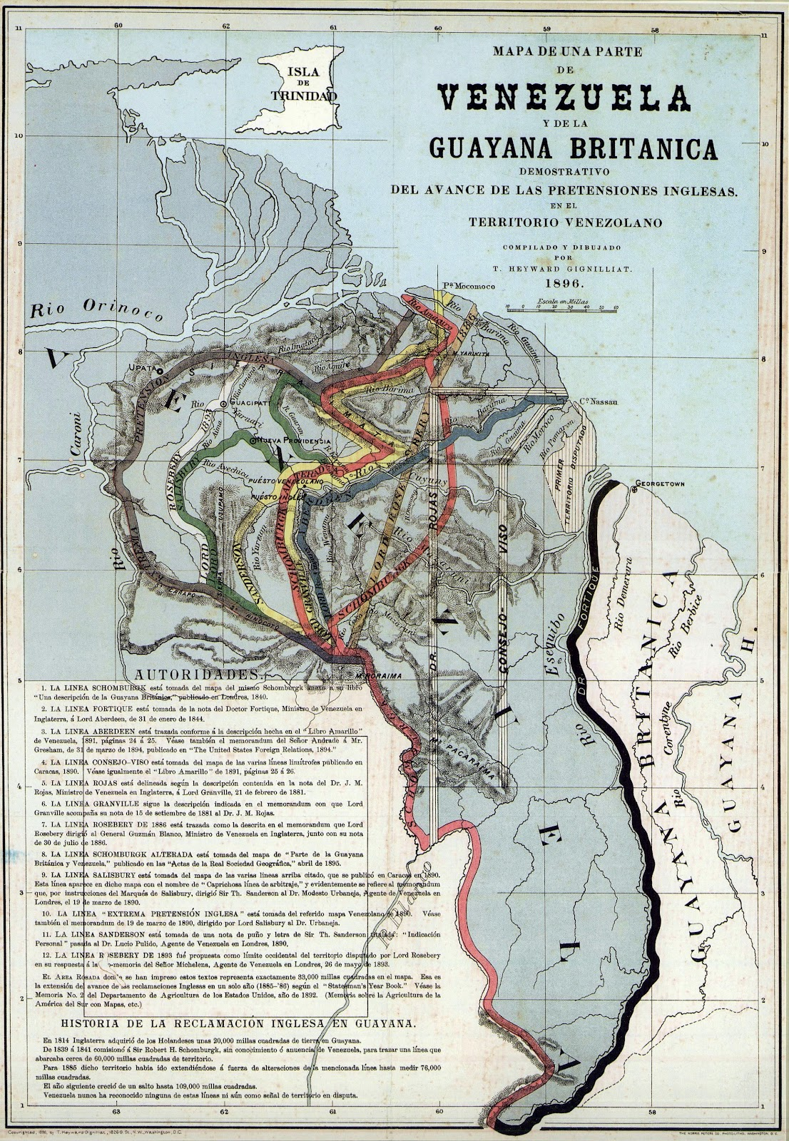 Mapa de una parte de Venezuela y de la Guayana Británica demostrativo de las pretensiones inglesas sobre territorio venezolano